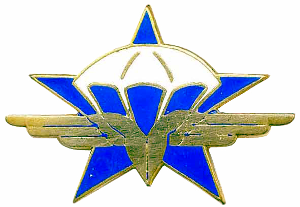 Insigne régimentaire du 1er Régiment de chasseurs parachutistes